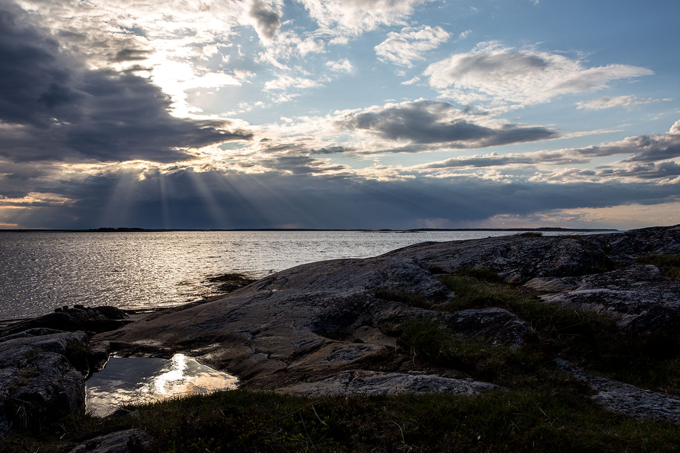 Сорокский заказник: В Беломорском районе в 10 км на юго-восток от г. Беломорск на территории Сумского и Шуерецкого лесничеств и акватории Белого моря с расположенными на ней островами: Большой Жужмуй, Малый Жужмуй, Салма-луды, Сумостров, Разостров, Седостров, Сосновый, Маникостров, Мягостров, а также группой малых островов,Беломорский район, This image is related to the protected area of Russia number 1010003